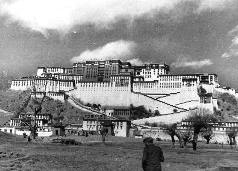 Lhasa, Potala